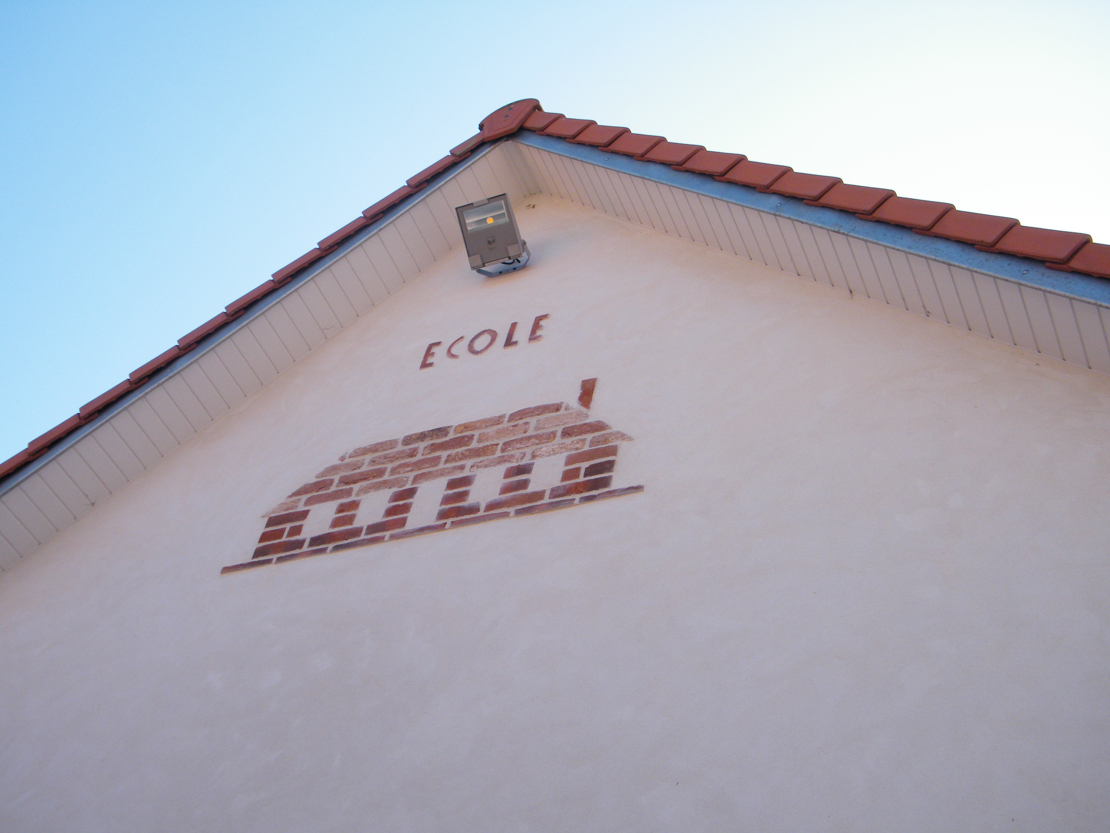 Bezinghem, Pas-de-Calais, Fr, école